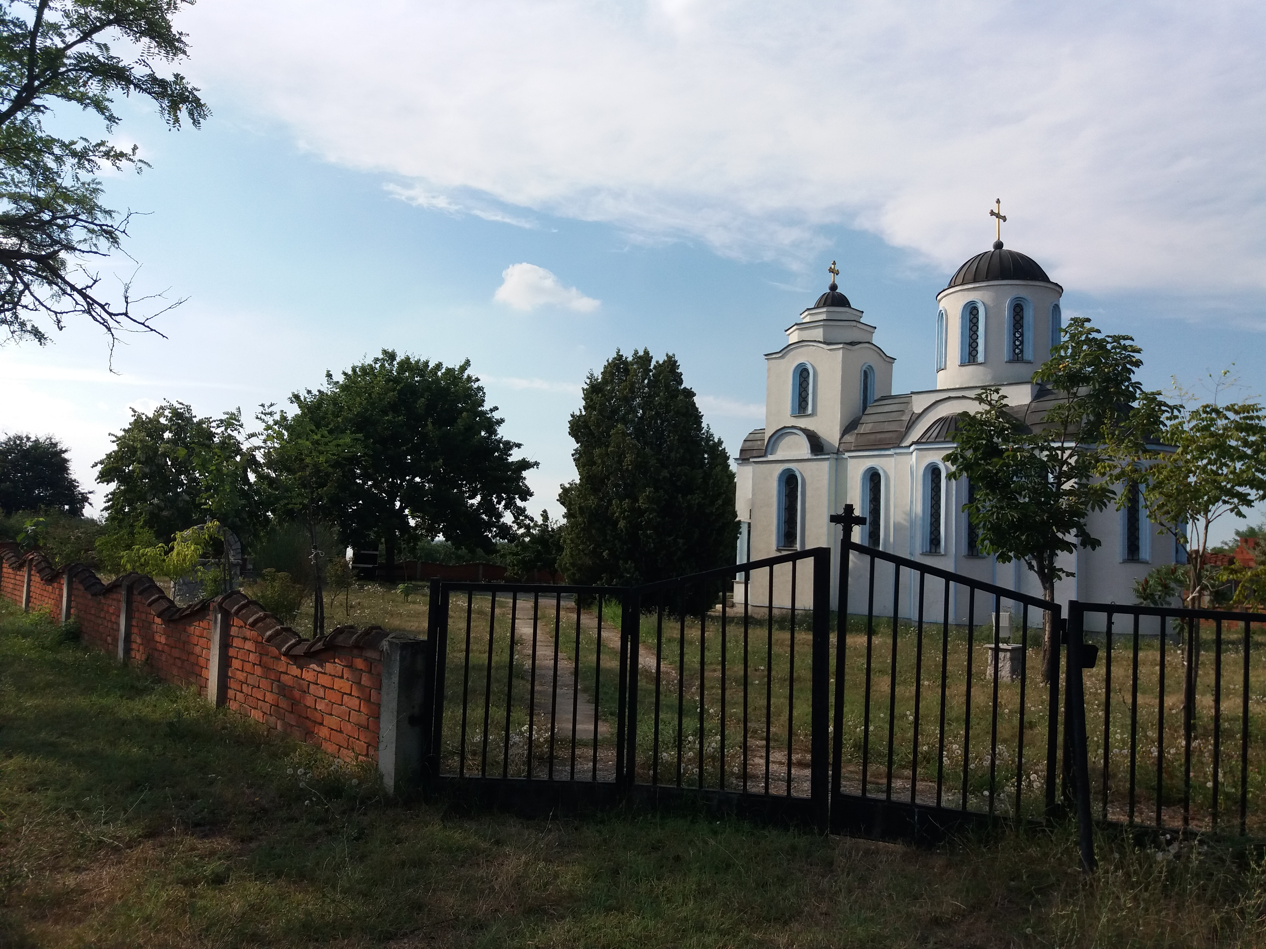 Srpski (latinica): Crkva Svetog Georgija, Pridvorice